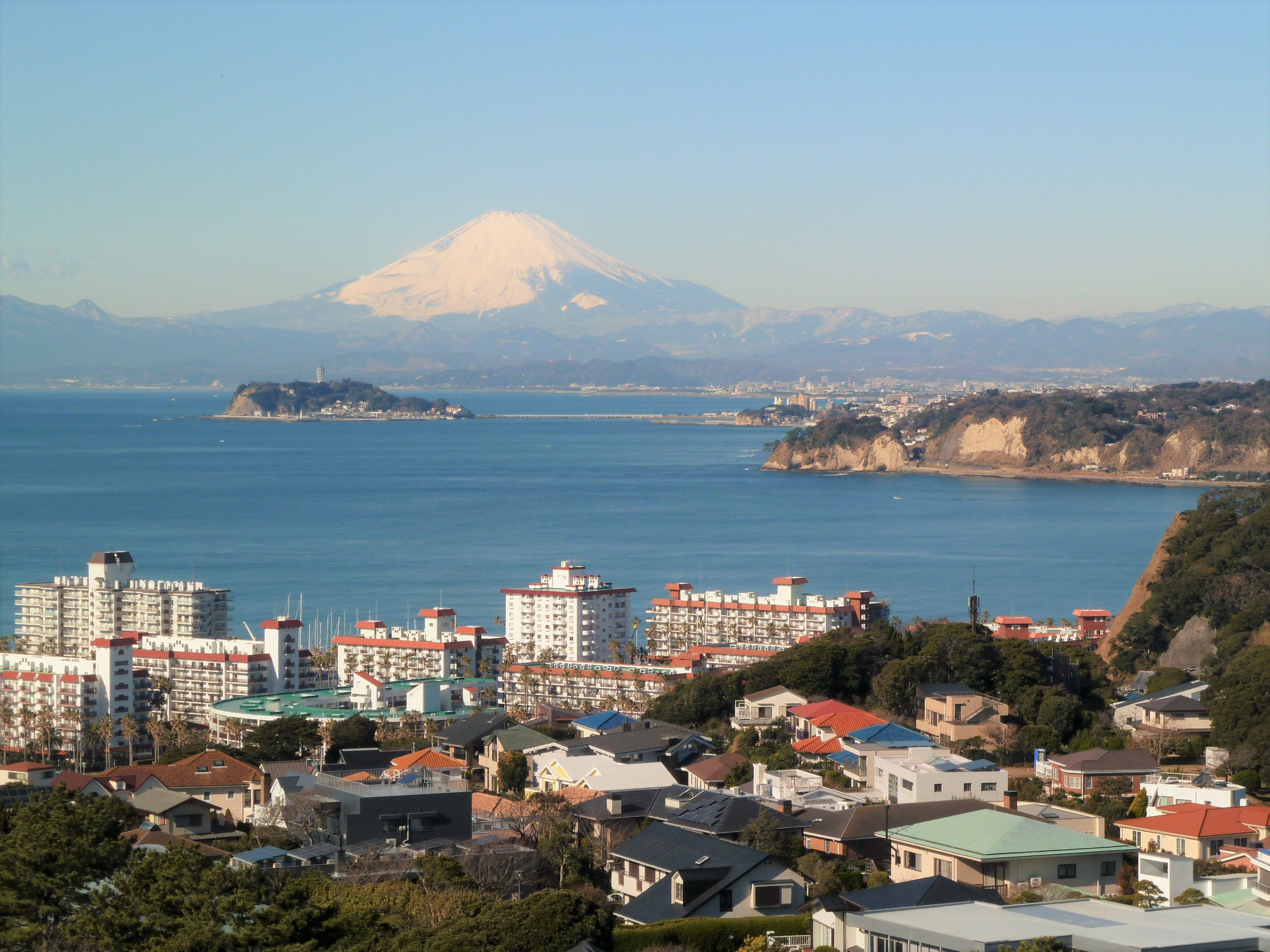 披露山公園から望む富士山と江の島と稲村ヶ崎(神奈川県逗子市)